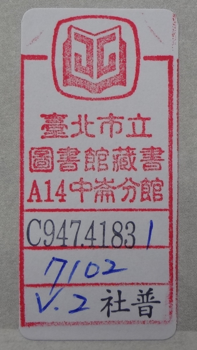 中文（台灣）: 臺北市立圖書館中崙分館藏書章貼紙，貼於書名頁。